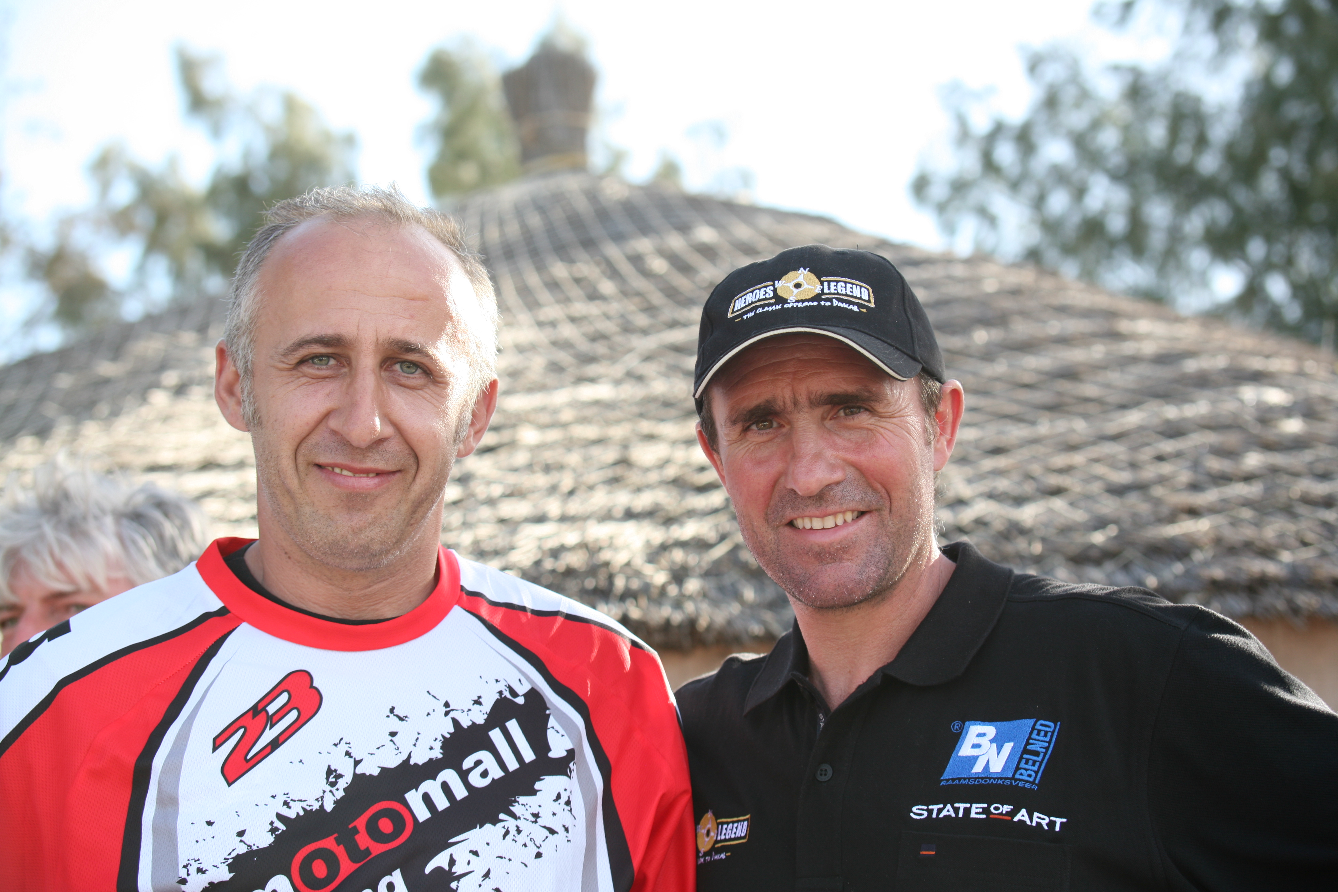 Cu Stephane Peterhansel